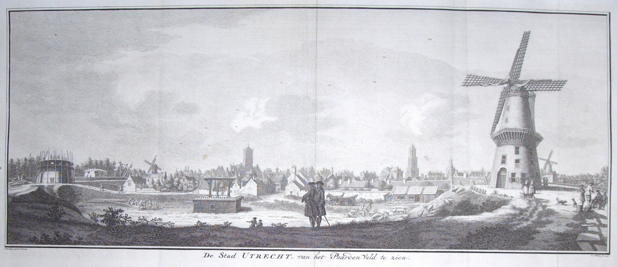 Gezicht op de stad Utrecht vanaf het Paardenveld met onder meer molen Rijn en Son (vooraan rechts) en de aanbouw zijnde De Meiboom (vooraan links). Daartussen de galg.